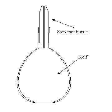 Pyknometer - eigen werk